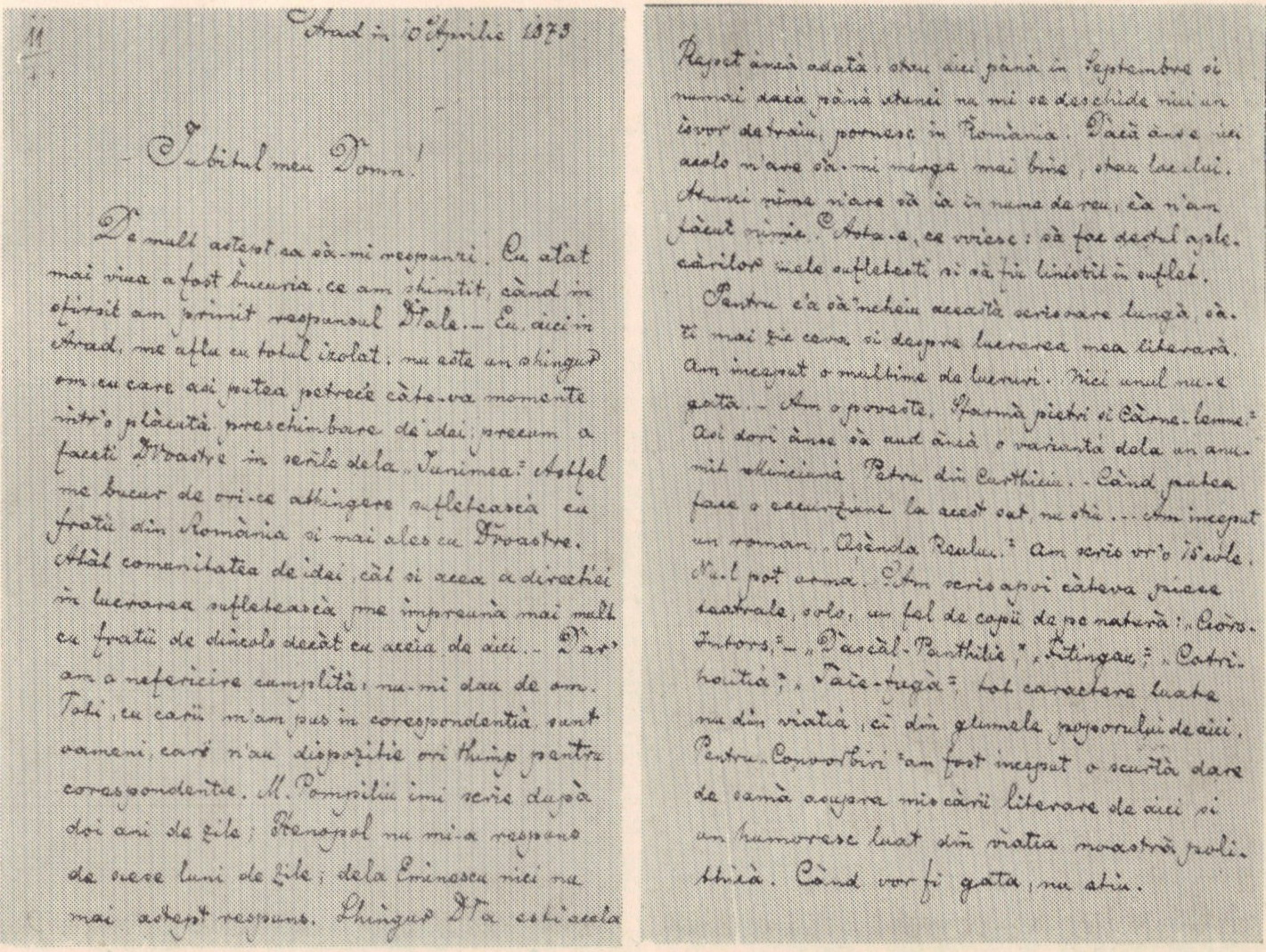 Pagini din scrisoarea lui I. Slavici către I. Negruzzi din 10 aprilie 1873, în care se menționează Osânda răului, prima încercare de roman a scriitorului (Manuscris aflat la Biblioteca Academiei Române)